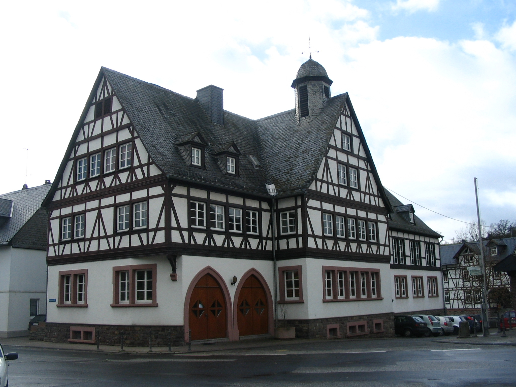 Mengerschied im Hunsrück, Gemeindehaus